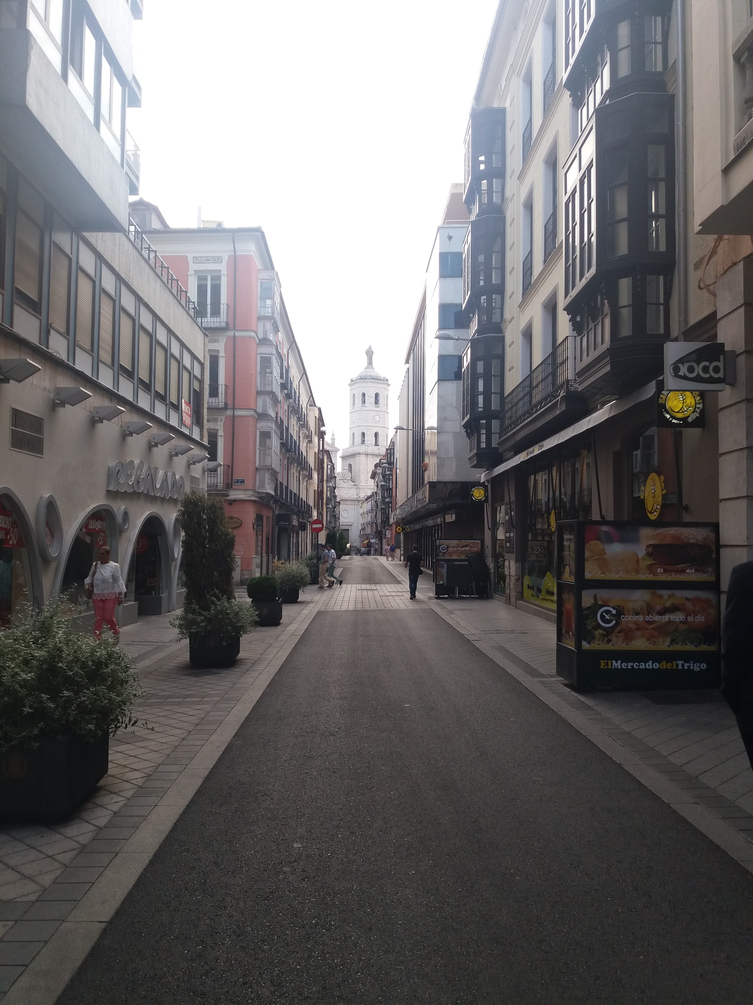 Calle de Regalado en Valladolid, ahora peatonal